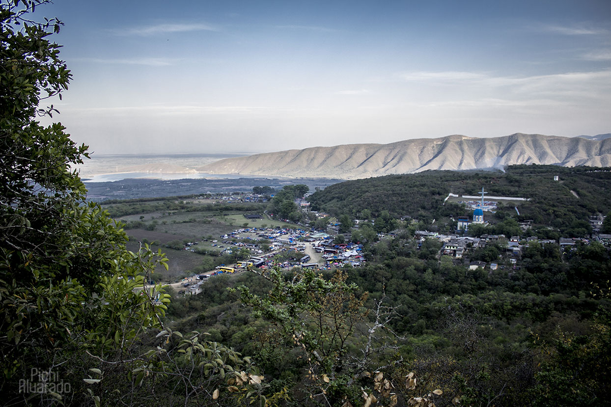 Panorámica El Chorrito 2018